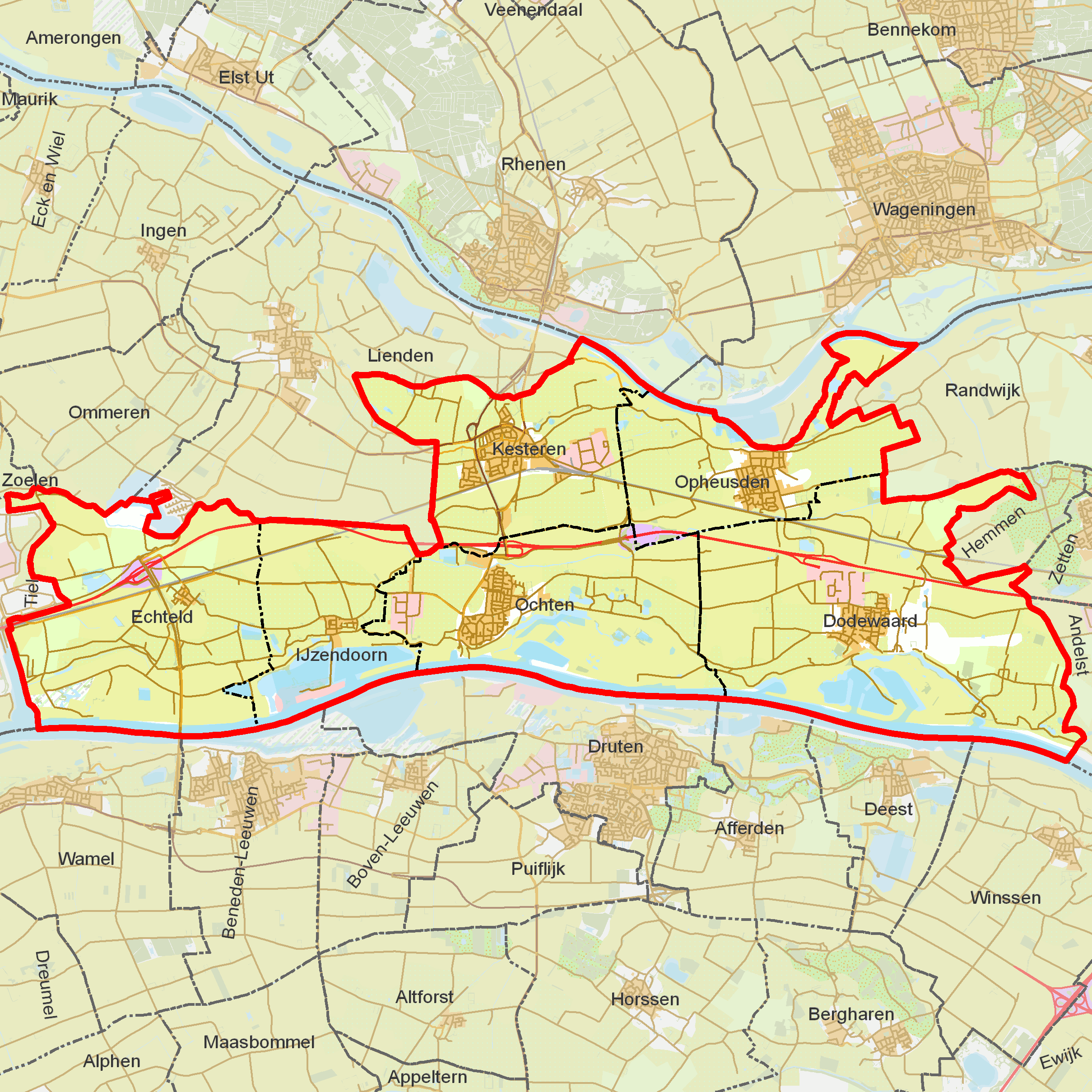 BAG woonplaatsen - Gemeente Neder-Betuwe.png